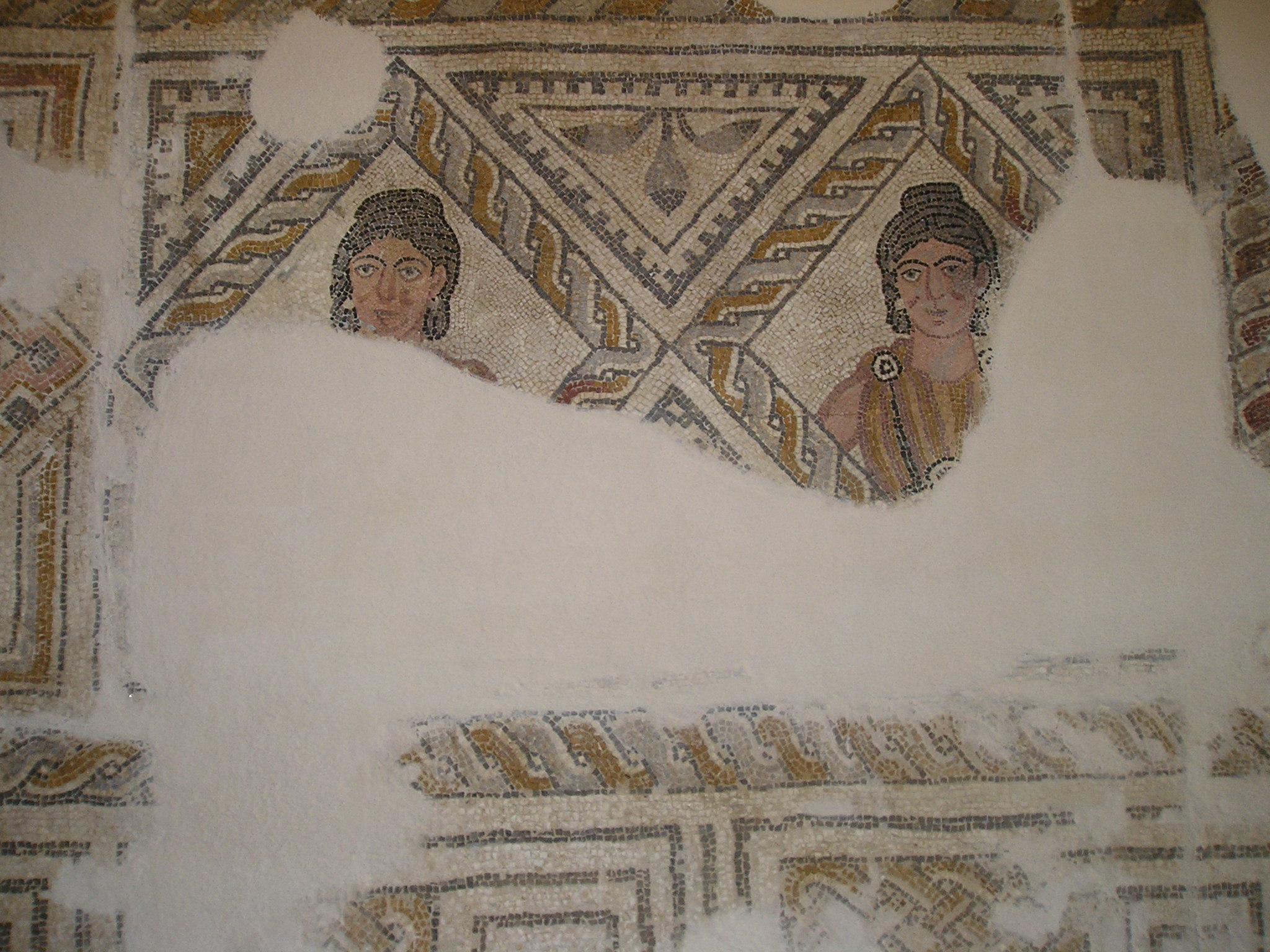 Mosaico romano del siglo IV con motivos geométricos y cabezas femeninas, procedente de la Villa romana de Olivar del centeno, en el término municipal de Millanes (o Millanes de la Mata) en la provincia de Cáceres (España), actualmente conservado en el Museo de Cáceres.